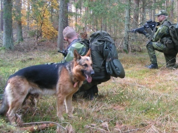 Hunden har en central roll i flygbasjägarnas stridsteknik